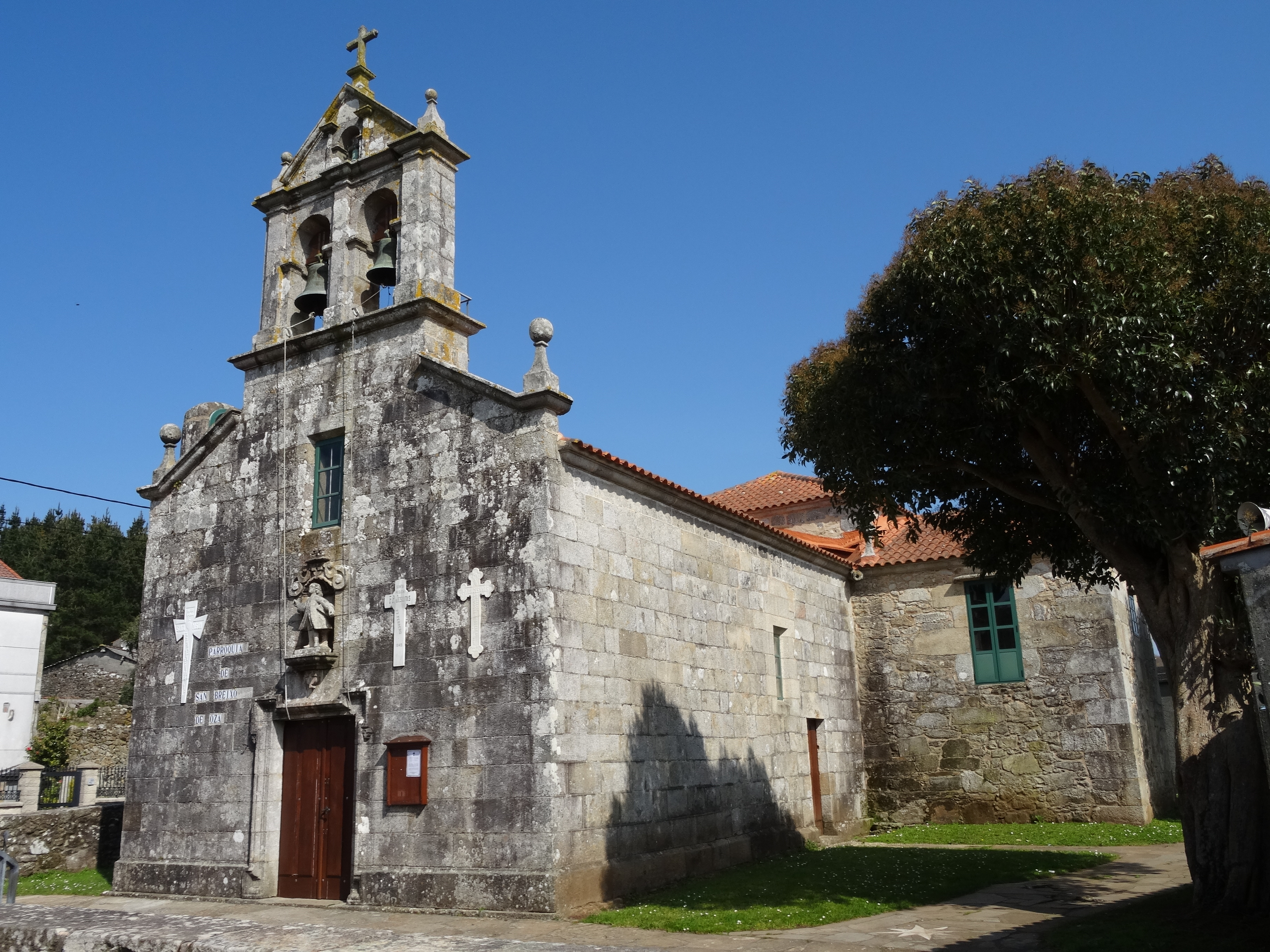 Igrexa de San Breixo de Oza, Carballo.